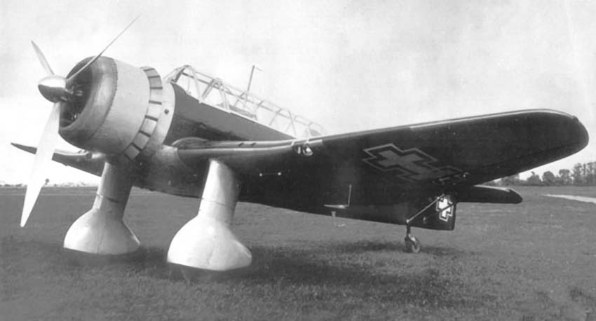 Prototyp litewskiego samolotu rozpoznawczo-bombowego ANBO-VIII.